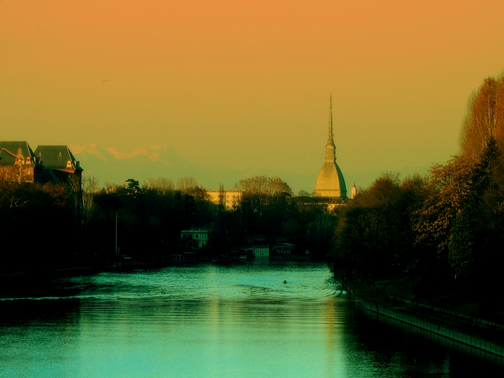 Torino, Piemonte, Italia